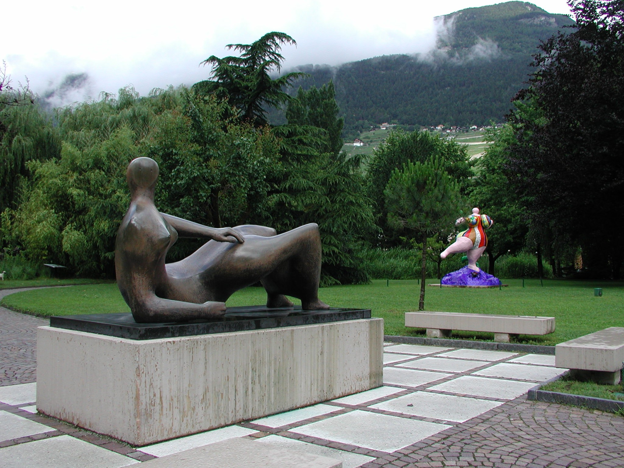 Skulpturen im Park der Fondation Gianadda in Switzerland